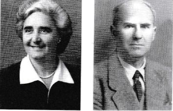 אמאטו וליטיציה ביור, ההורים המאמצים של ראובן קמפניינו (מתוך: "לדור אשר לא ידע" )